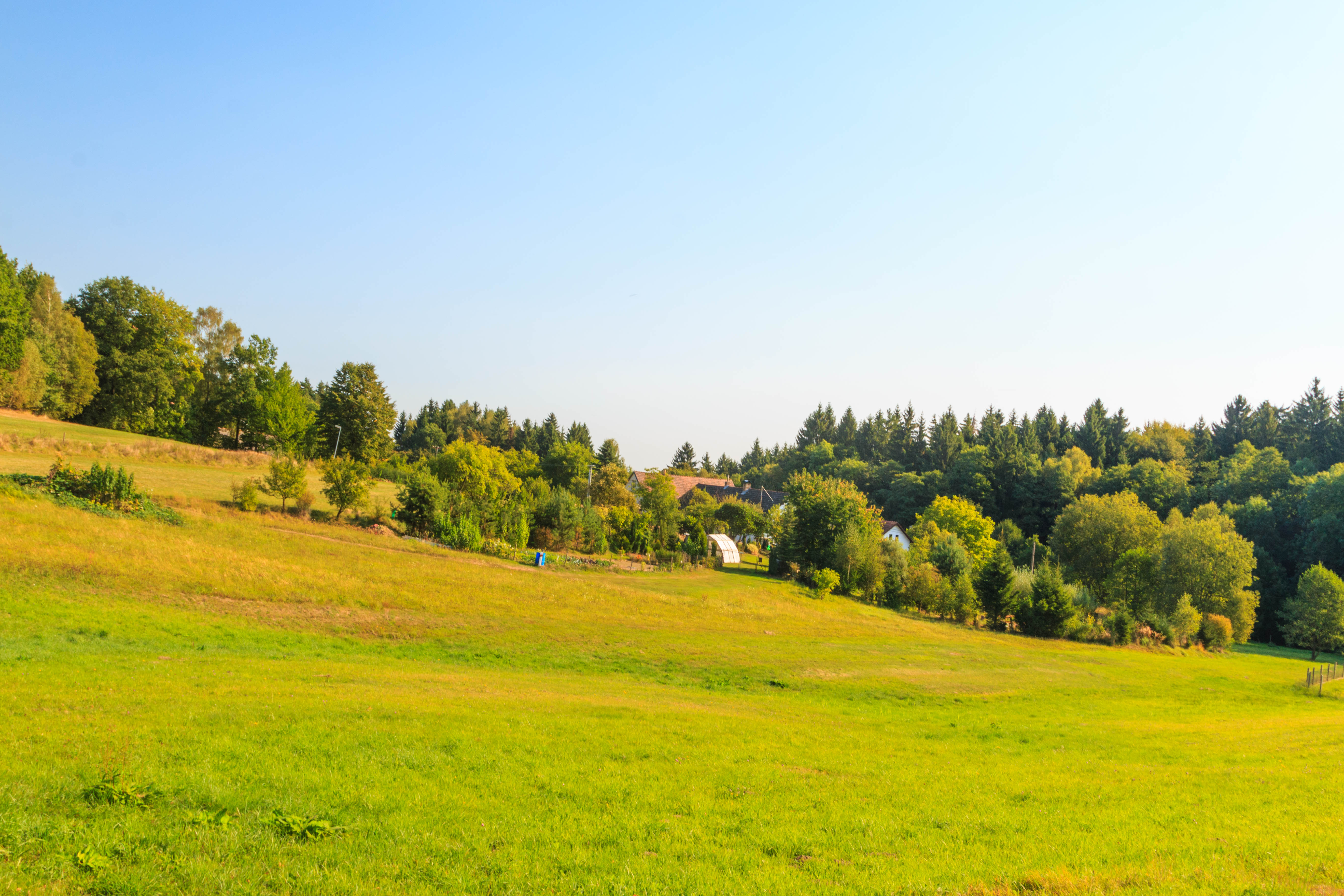 Staré Hutě u Kaliště